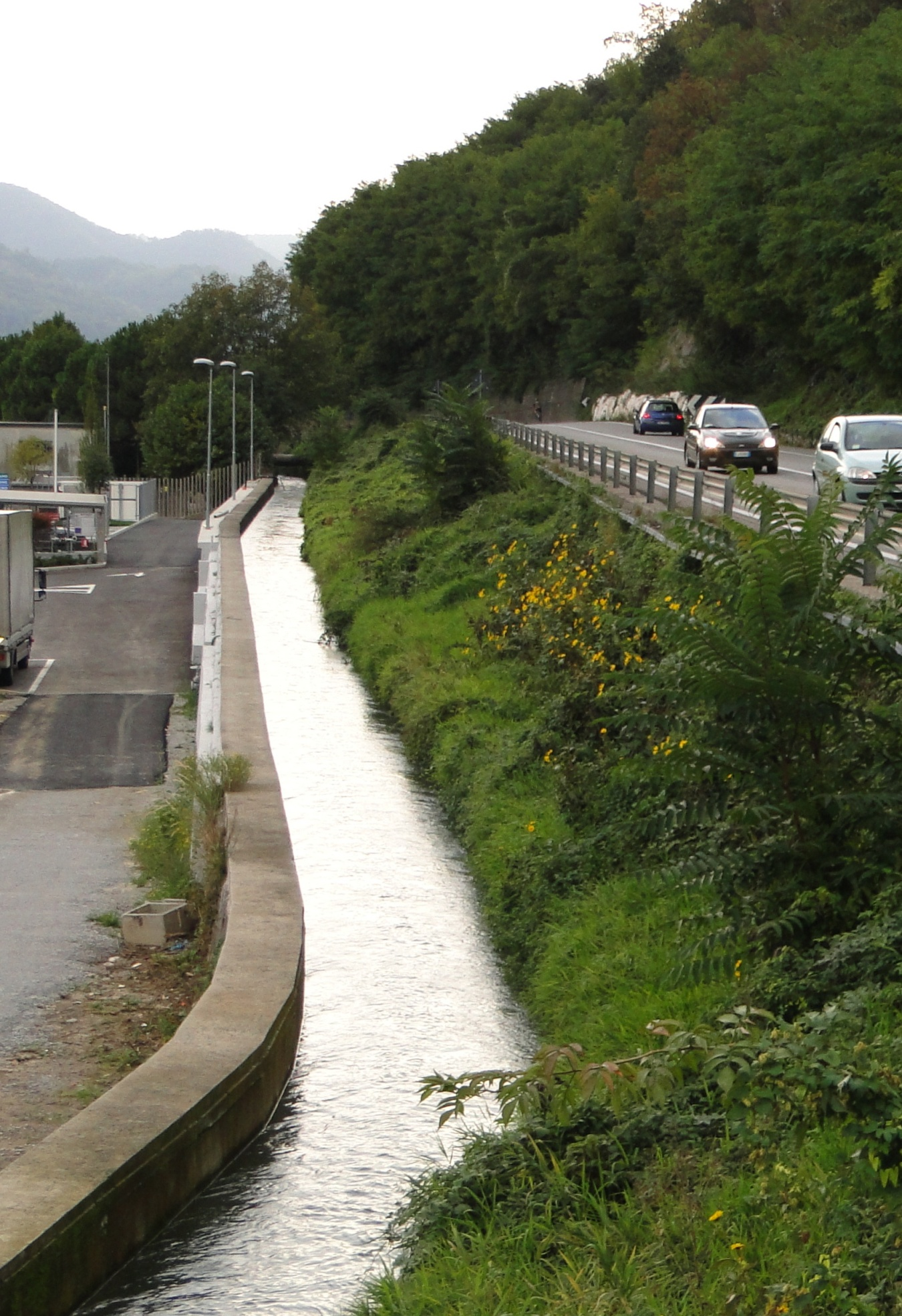 Comenduno, fraz. di Albino (BG), roggia Comenduna